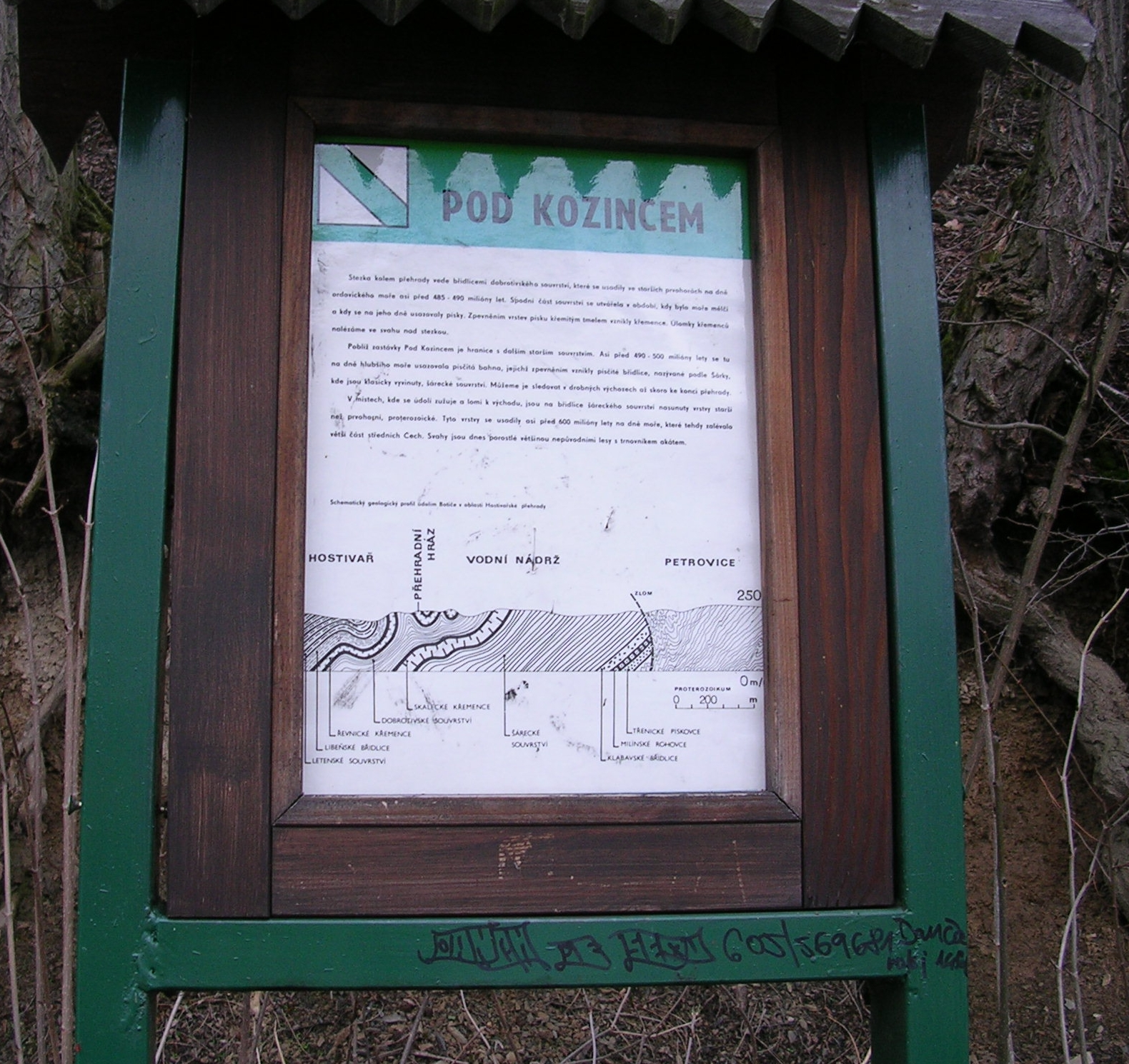 Praha, Hostivař, Pod Kozincem, zastávka naučné stezky Povodím Botiče. Viz